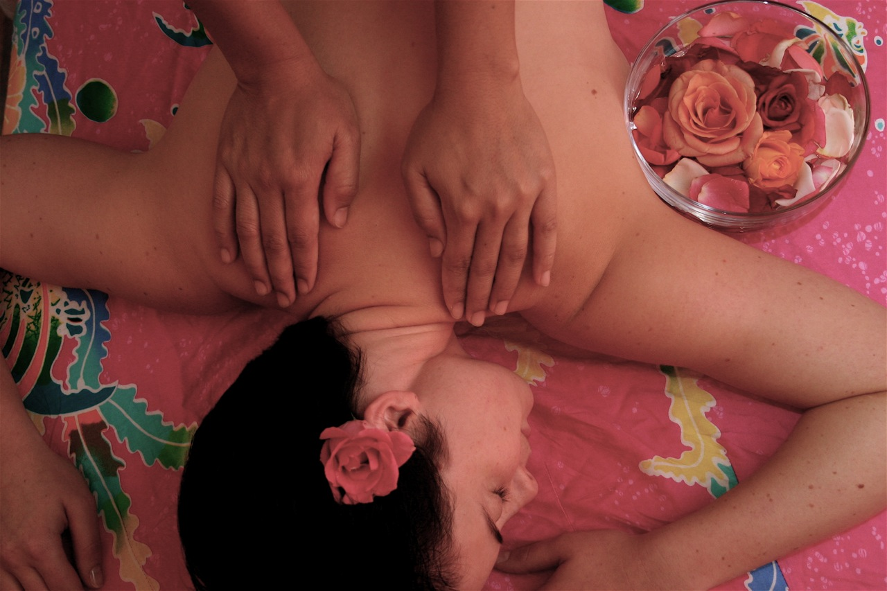 Massage in Frankfurt, Germany